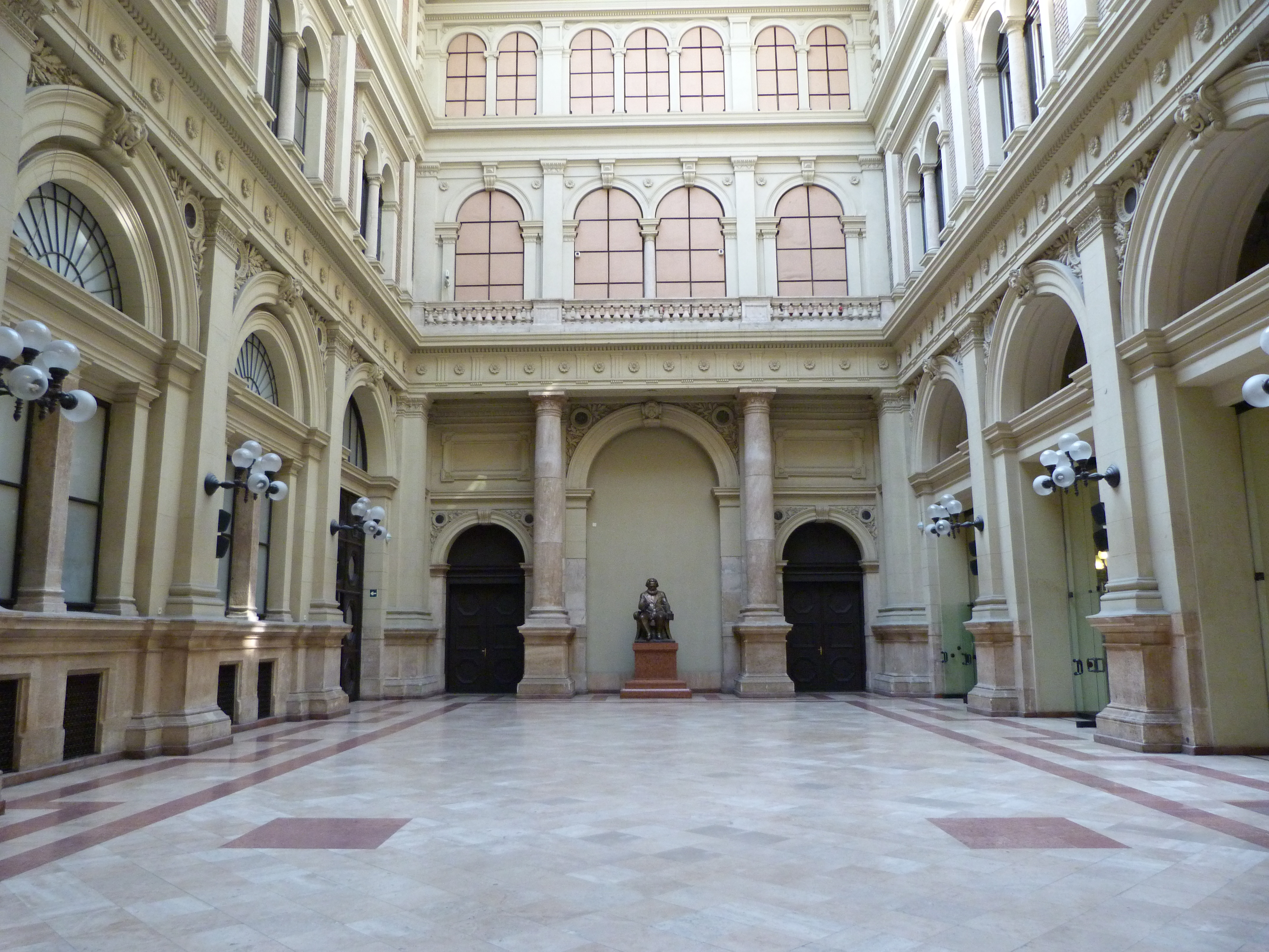 A felvétel 2014. június 12 -én csütörtökön készült Budapesten, a Budapesti Corvinus Egyetemen. ©© Derzsi Elekes Andor, Budapest, 2014, A fénykép egészben, vagy részletekben másolását, bármilyen úton történő sokszorosítását és felhasználását a szerző ellenérték nélkül, jogutódjaira is kihatóan megengedi. Az engedély kiterjed a kereskedelmi célú hasznosításra is. Kéri azonban nevének feltüntetését a felhasználás során. A Metapolisz sorozat valamennyi képe és filmje Creative Commons alatti valamint kereskedelmi - for profit - célra is felhasználható. Ajánlott hivatkozás: Derzsi Elekes Andor: Metapolisz DVD line